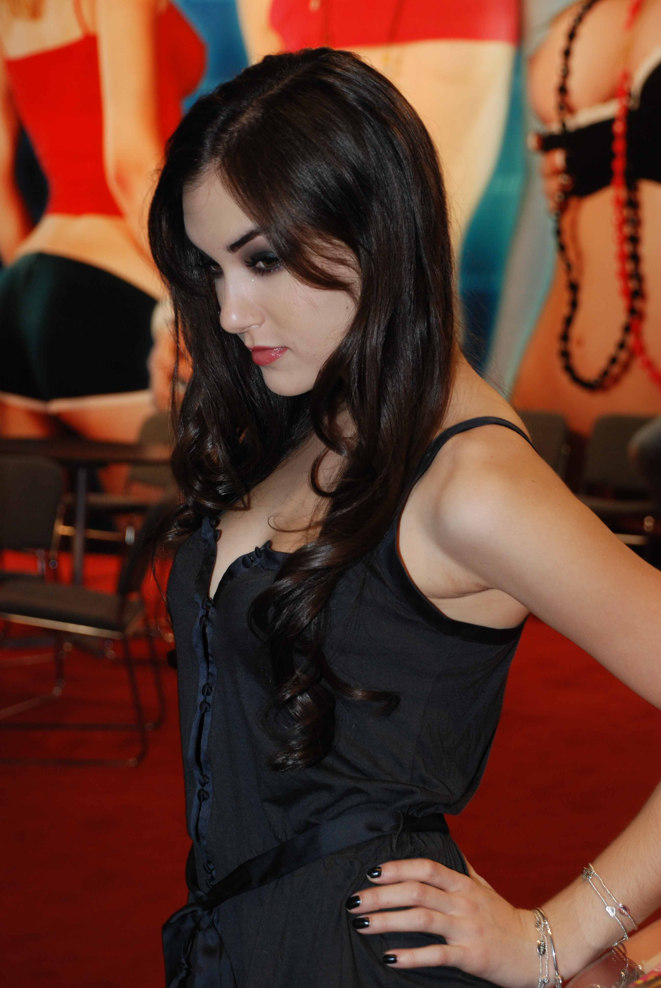 AEE2009_Jan11_Nikon 468